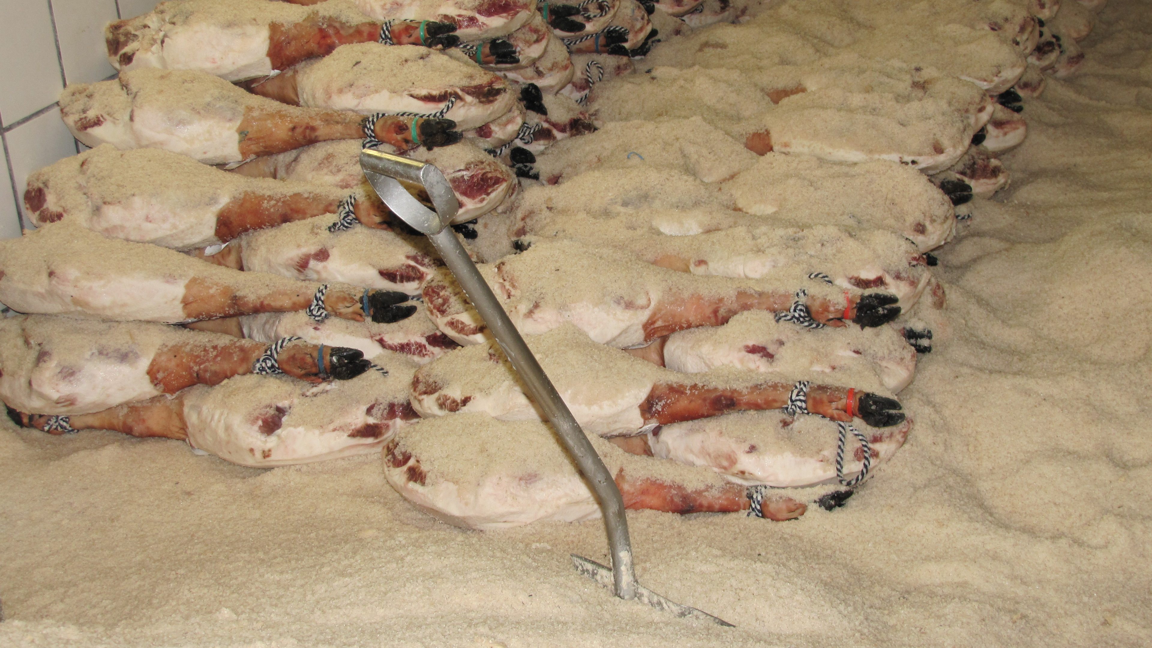 Jamones de Bellota en su proceso de salado, rodeados de sal, en las bodegas de BEHER, Bernardo Hernández, en la Denominacion de Origen Jamón de Guijuelo, provincia de Salamanca, España.